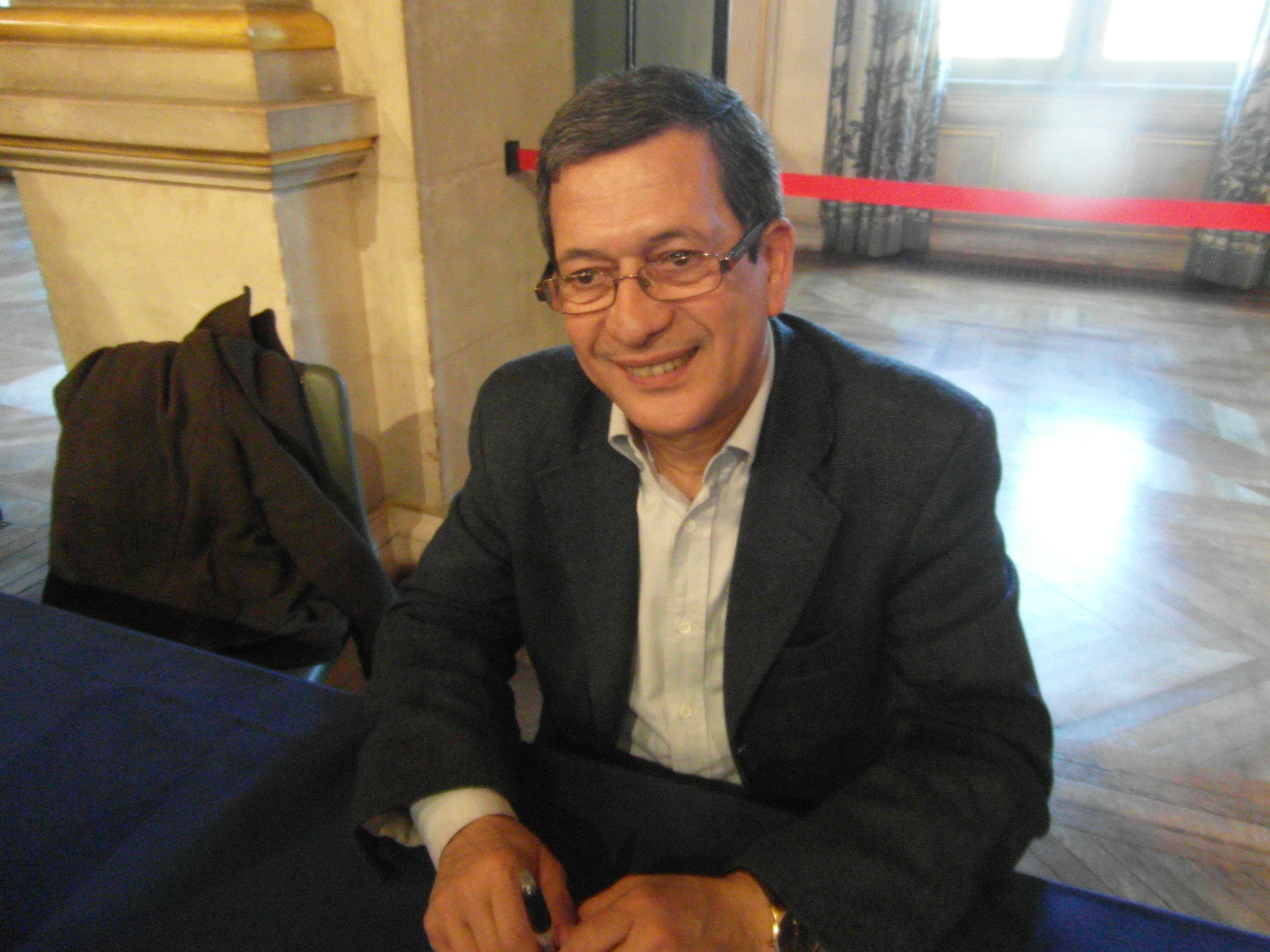 Maghreb des Livres, 7 et 8 février 2015